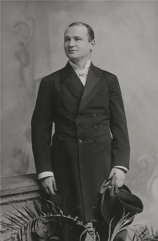 Karel Mušek (1867 - 1924), Český divadelní herec, režisér, překladatel a publicista.